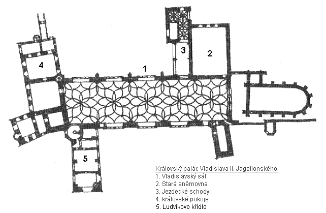 Půdorys